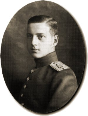 Grão-Duque Dmitri Pavlovich